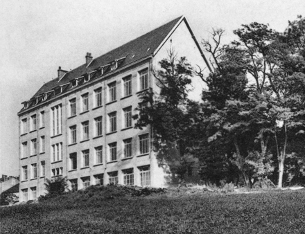 L'ancien collège de jeunes filles de Périgueux (Dordogne, France).